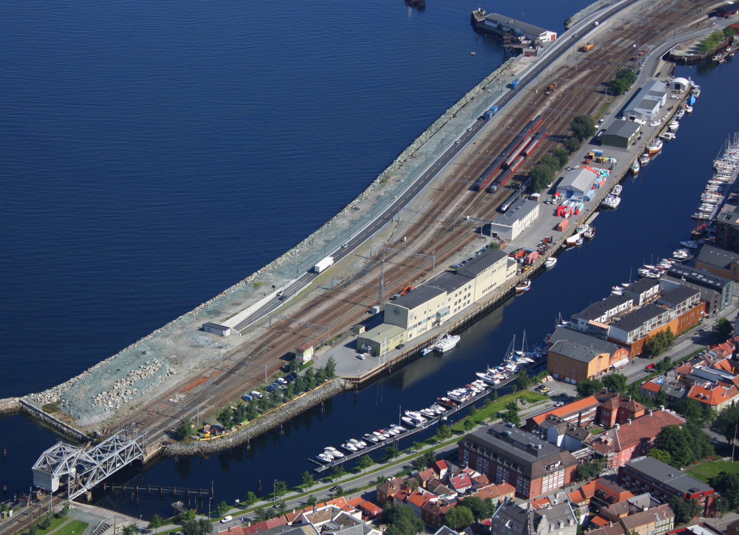 Vestre Kanalhavn med togsporet inn til Trondheim sentralstasjon. Nede til venstre Skansen bru. Parallelt med jernbanesporet dukker Nordre avlastningsveg opp, med nedkjørsel til Skansentunnelen.